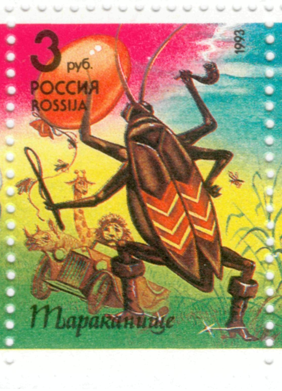 Почтовая марка Тараканище. Из сцепки из пяти почтовых марок "Сказки". Россия. 1993.